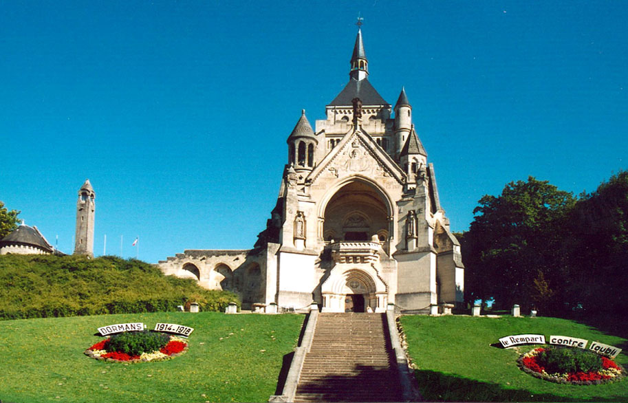 Memorial des batailles de la Marne 2005